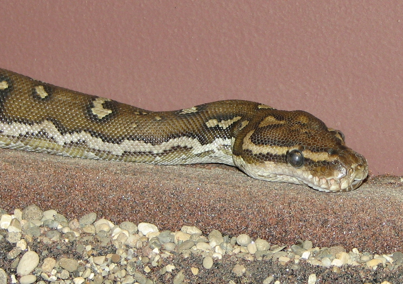 Angolian Python - Python anchietae